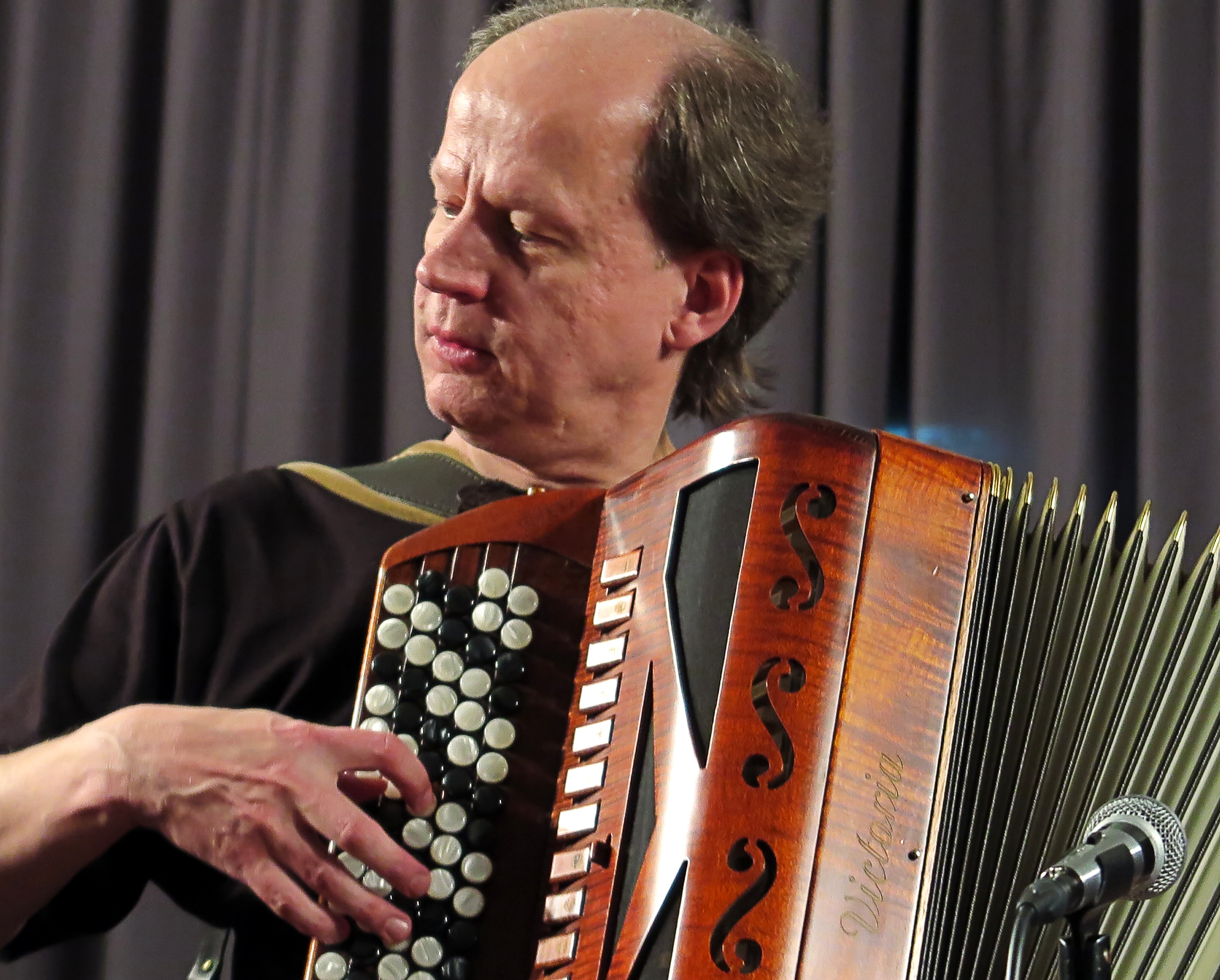 Der Hackbrett- und Knopfakkordenspieler Rudi Zapf im Dezember 2014 bei einer Vorstellung im Kloster Seeon